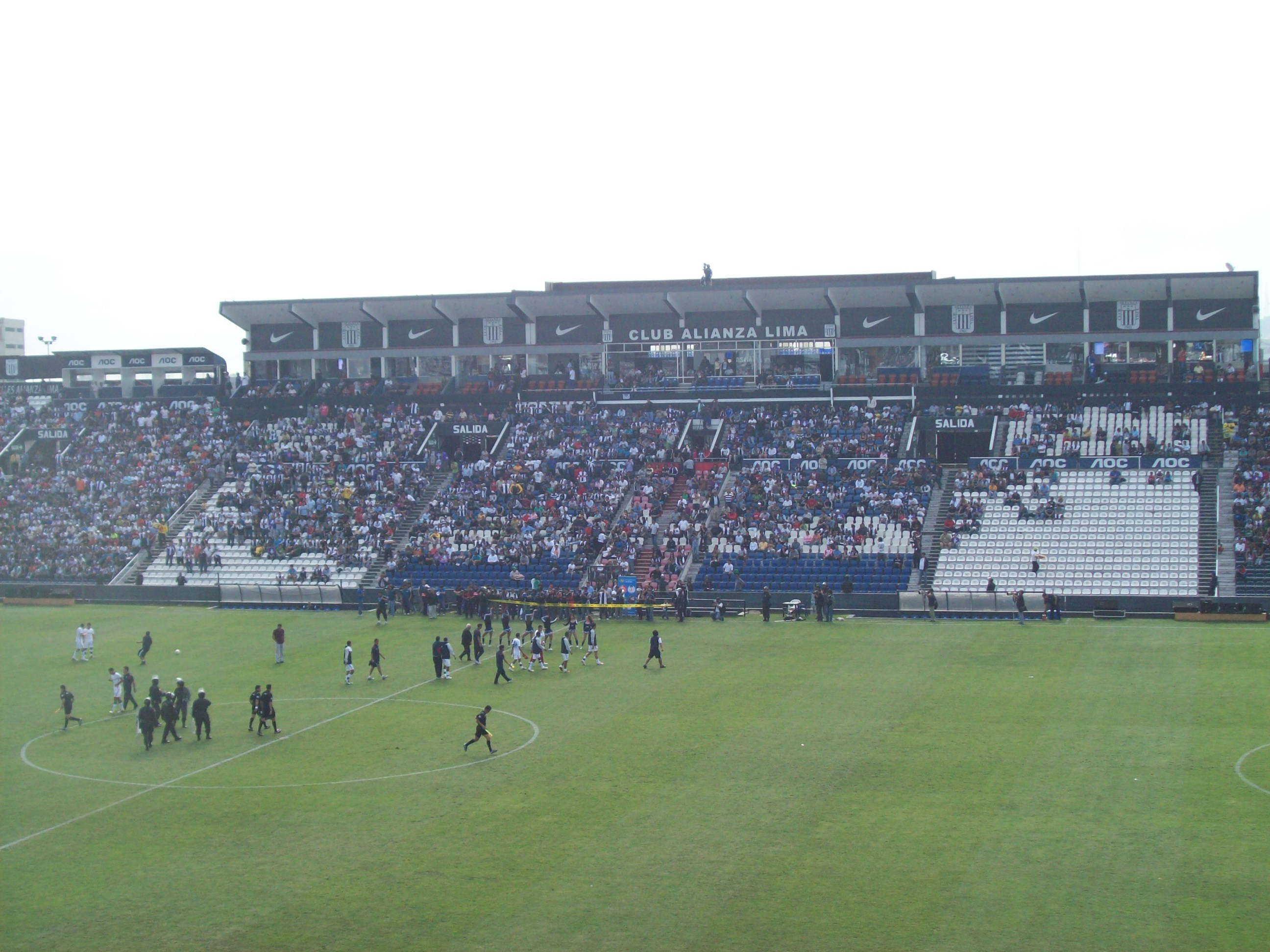 Imágen de la tribuna de occidente del estadio Alejandro Villanueva en los momentos previos al encuentro entre Alianza Lima y la Universidad San Martín. El partido se disputó el 30 de octubre de 2011 (fecha 26 del Campeonato Descentralizado) y finalizó 0-0.